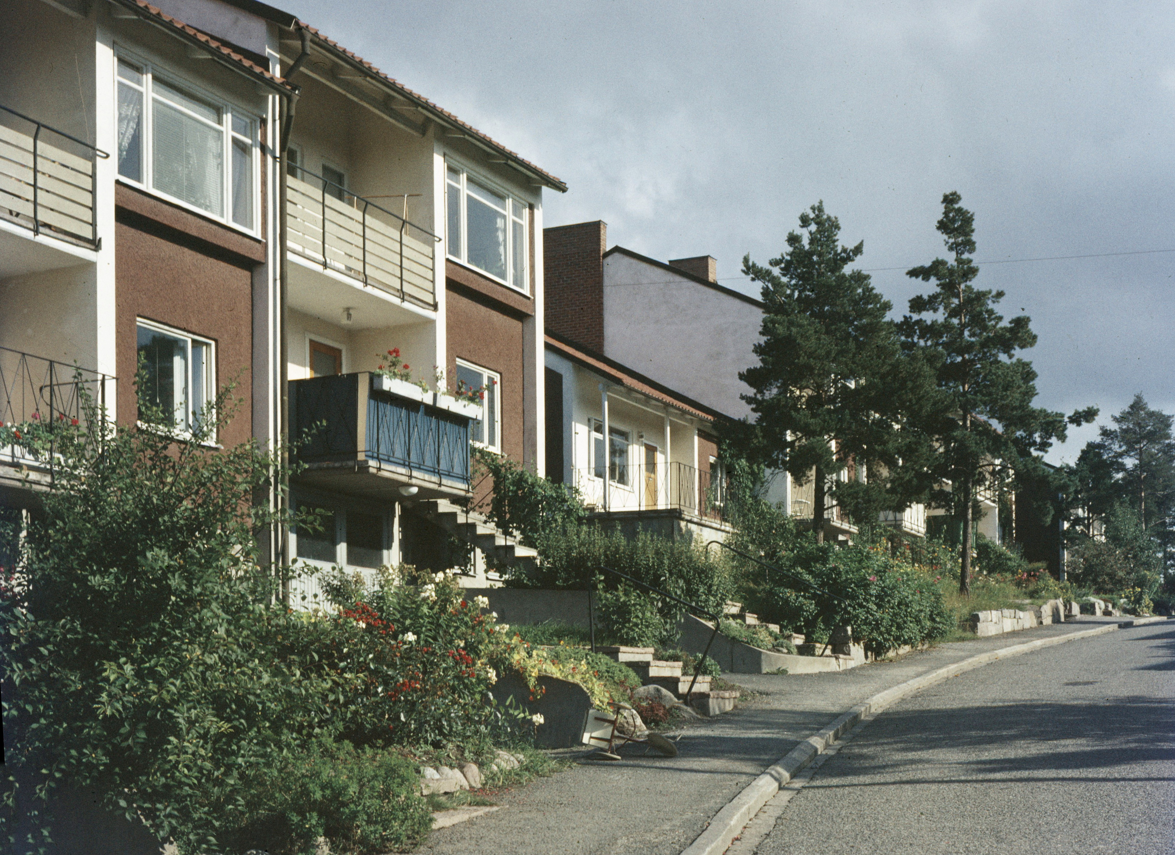 Vivstavarvsvägen sedd mot nordost